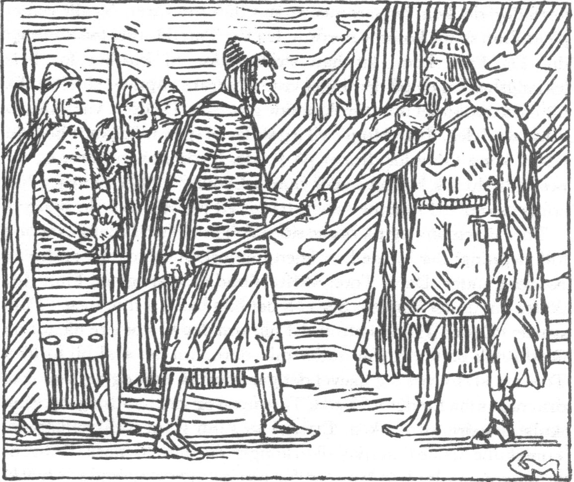 Gerhard Munthe: Illustration for Olav den helliges saga, Heimskringla 1899-edition. nn: «Finn Arnesson set spydodden for brystet på Tore Hund.» .